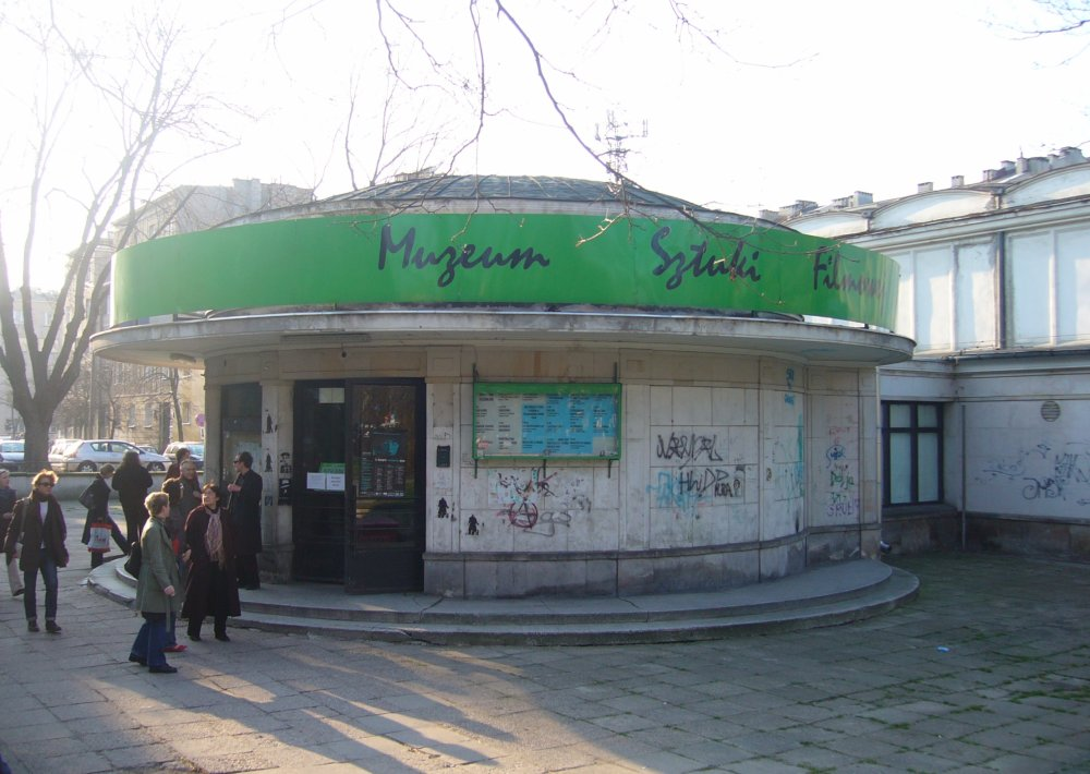 Kino Iluzjon w Warszawie